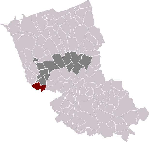 Locatie gemeente Nieuwerleet in arrondissement Duinkerke. Zelfgemaakt. Location of Nieurlet municipality in the arrondissement of Dunkirk. Self made. Localisation de la commune de Nieurlet dans l'arrondissement de Dunkerque. Fait moi-même.